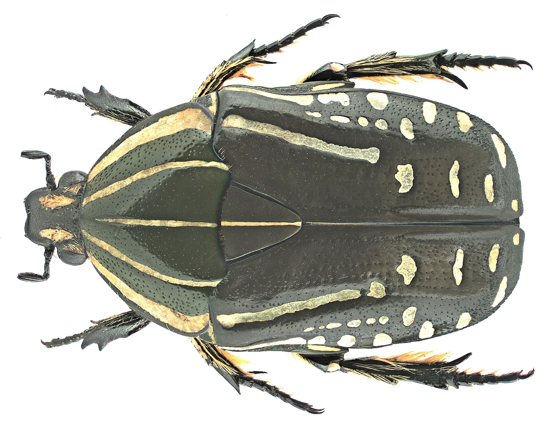 Familie: Scarabaeidae Groesse: 20 mm Verbreitung: tropisches Afrika Fundort: Malawi, 1980 det. Schein Photo: U.Schmidt, 2006